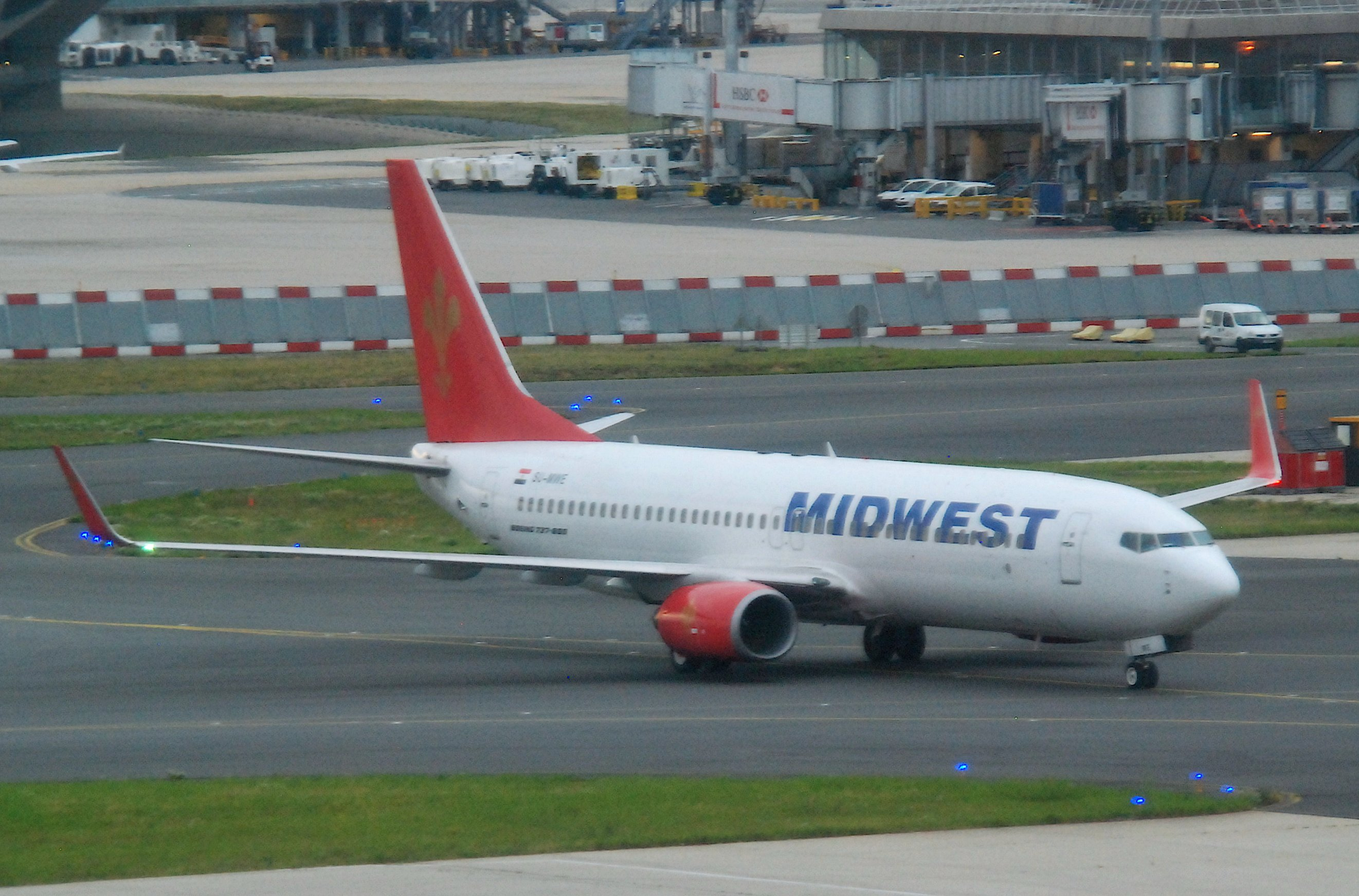 Midwest Airlines Boeing 737-8Q8; SU-MWE@CDG;09.07.2011/604cx